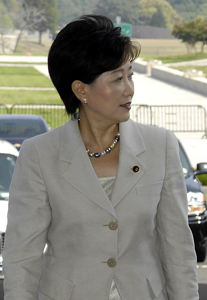 Minister defense Yuriko Koike comes in pentagon.